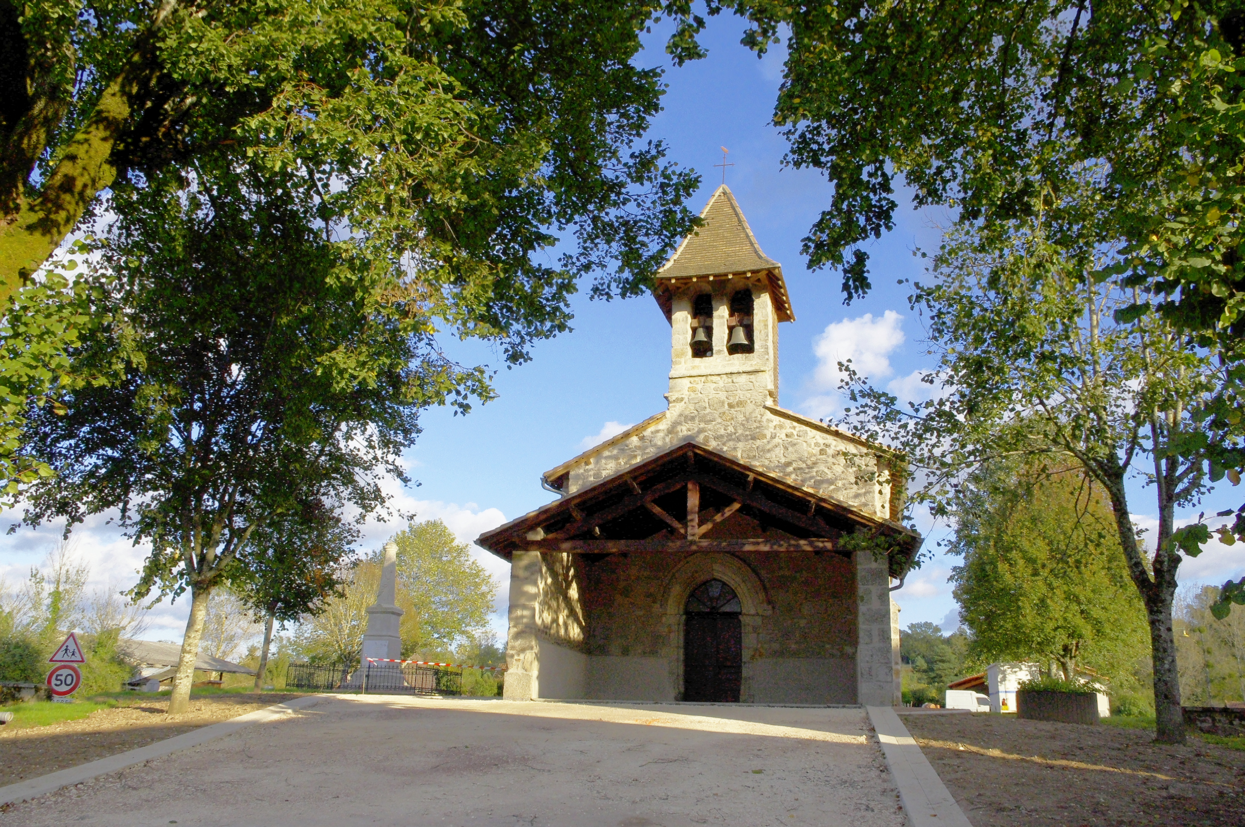 Savignac-de-Nontron, Dordogne, France - l'église Saint Pierre ès Liens